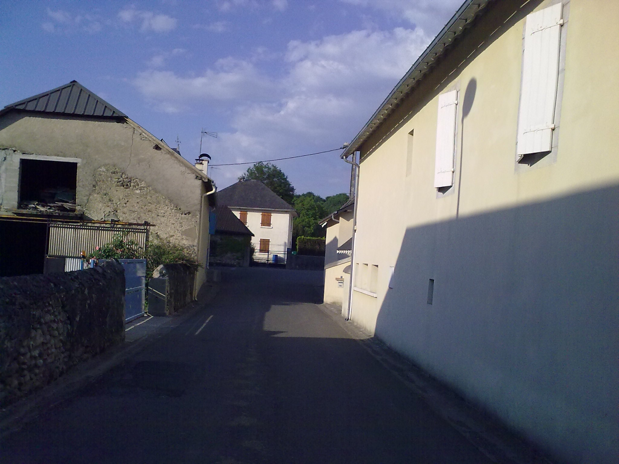 Herrère le 24 mai 2010. France.